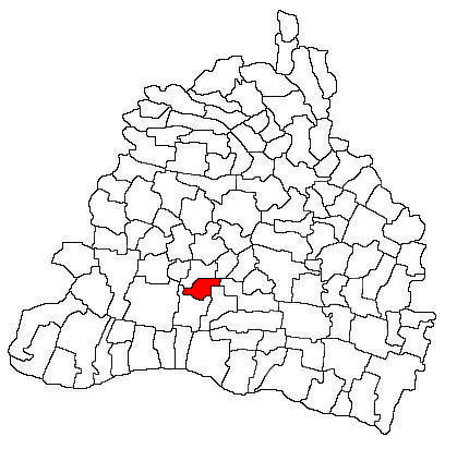 Amplasarea în cadrul județului.